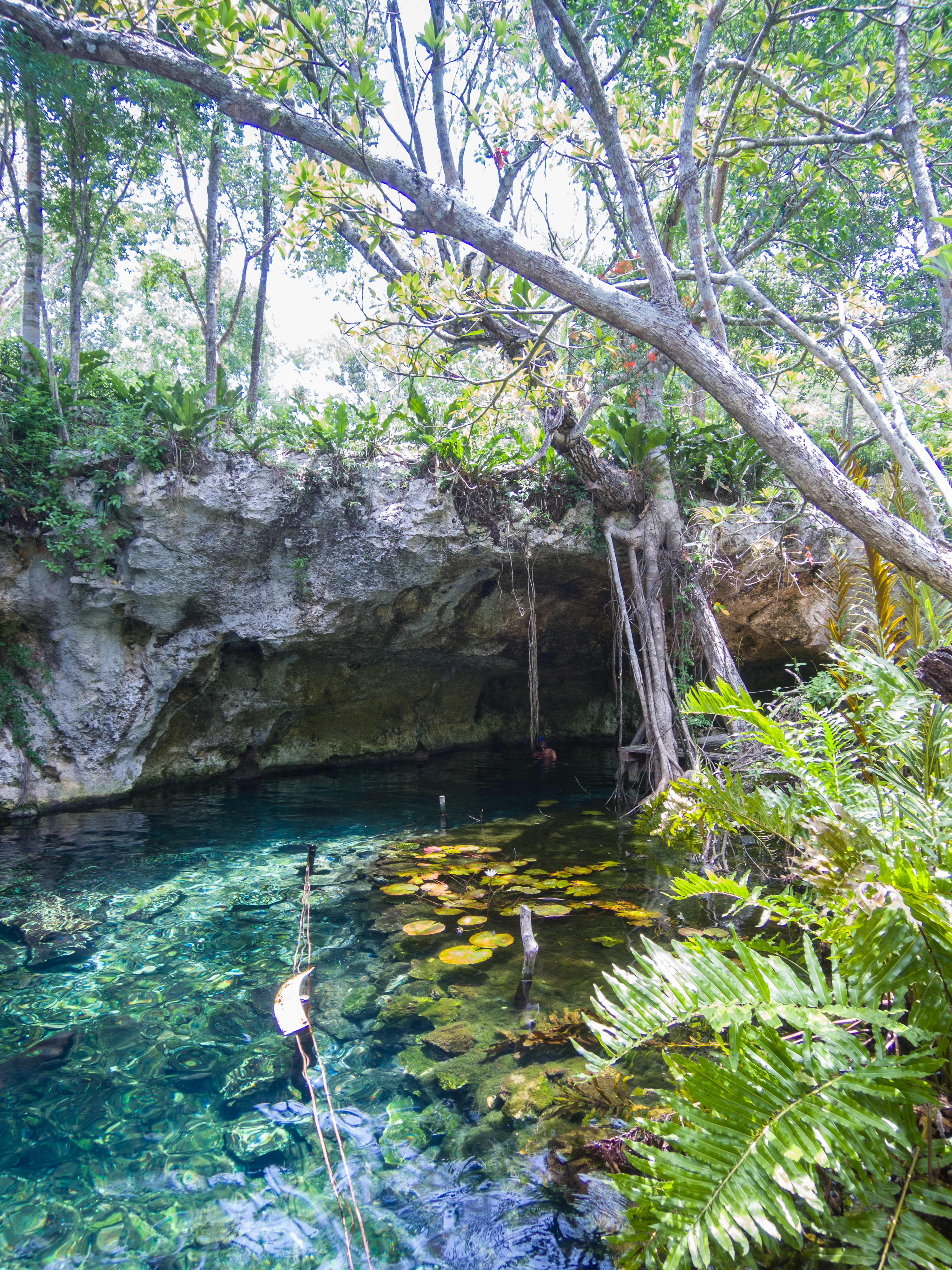 Gran cenote Tulum